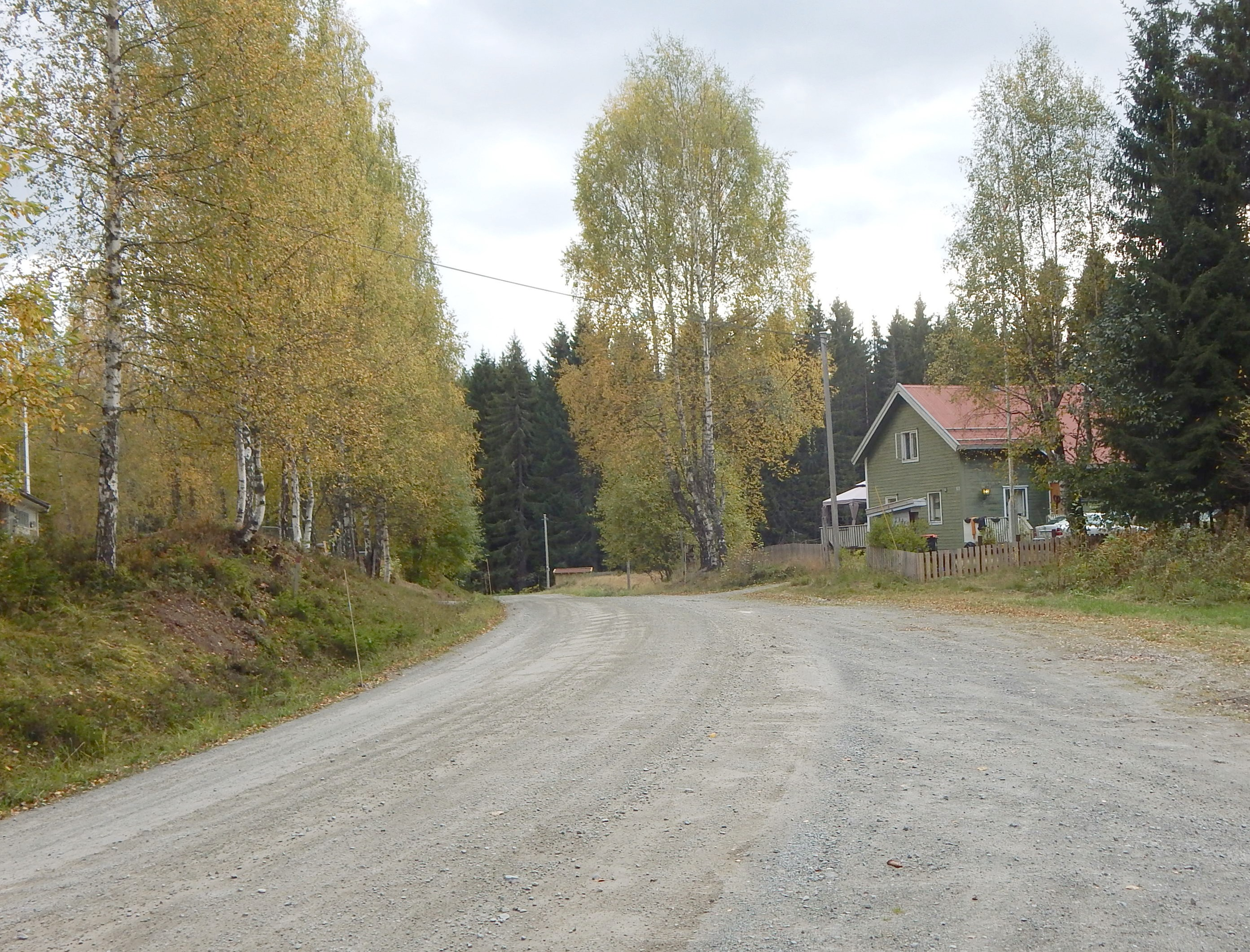 Nordheimvegen (fylkesvei 1670, tidl. 14)